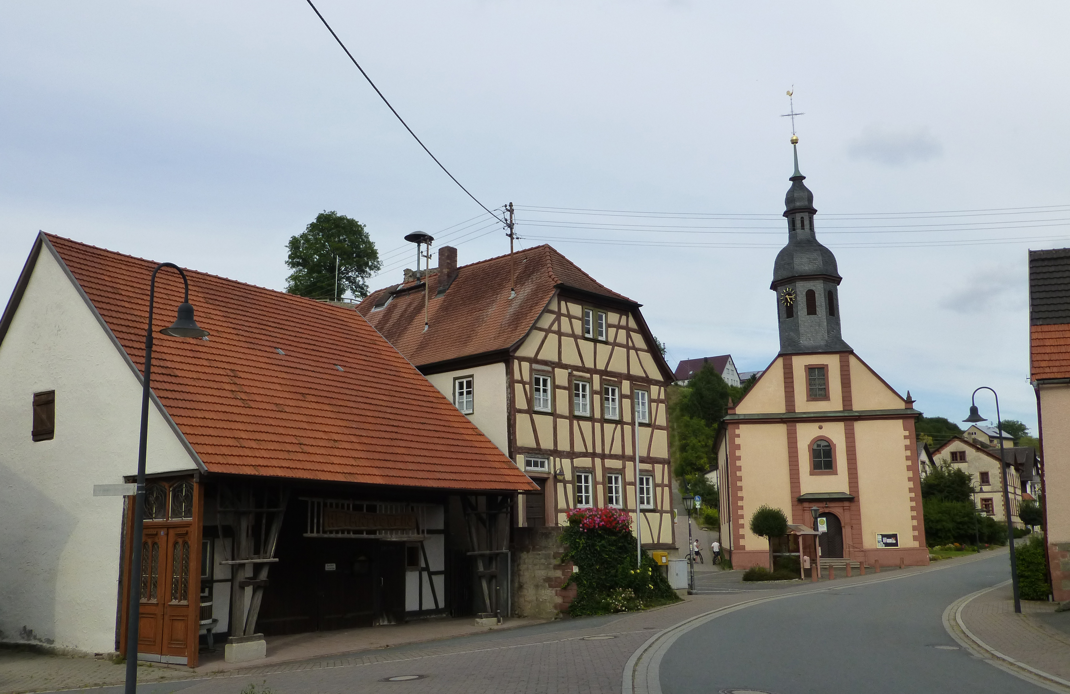 Maisons et église à Schweinberg, commune de Hardheim, Bade.